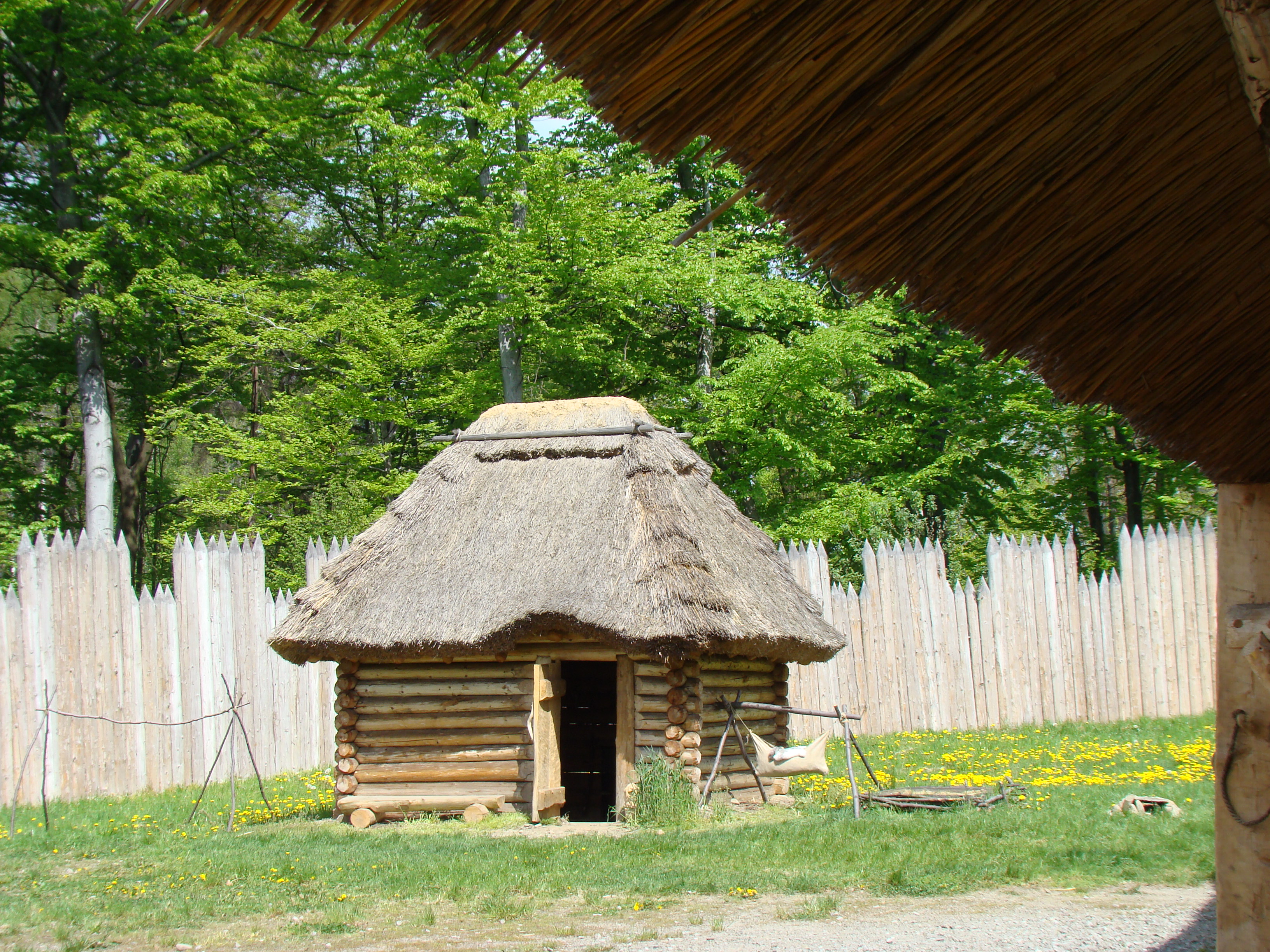 Archeopark Podobora in Chotěbuz (Kocobędz)